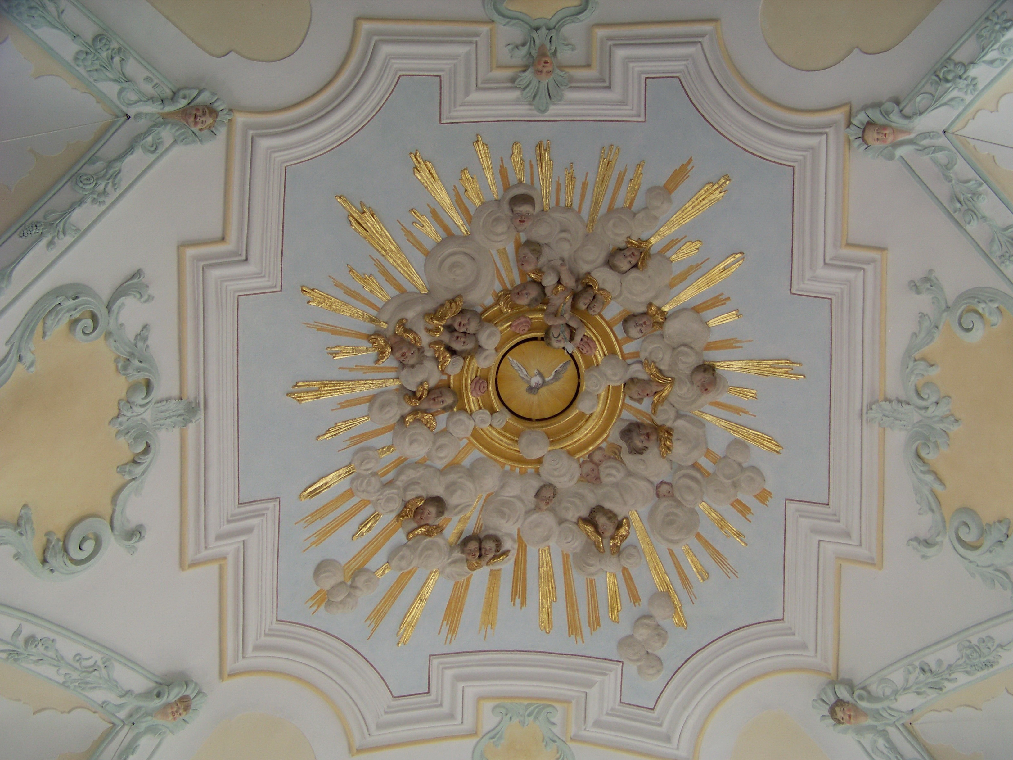 Wildenberg, Pürkwang, Am Kirchberg 9. Katholische Pfarrkirche St. Andreas. Das sogenannte "Heiliggeistloch" ist von einem Strahlenkranz mit Stuckwolken und Putten umgeben.